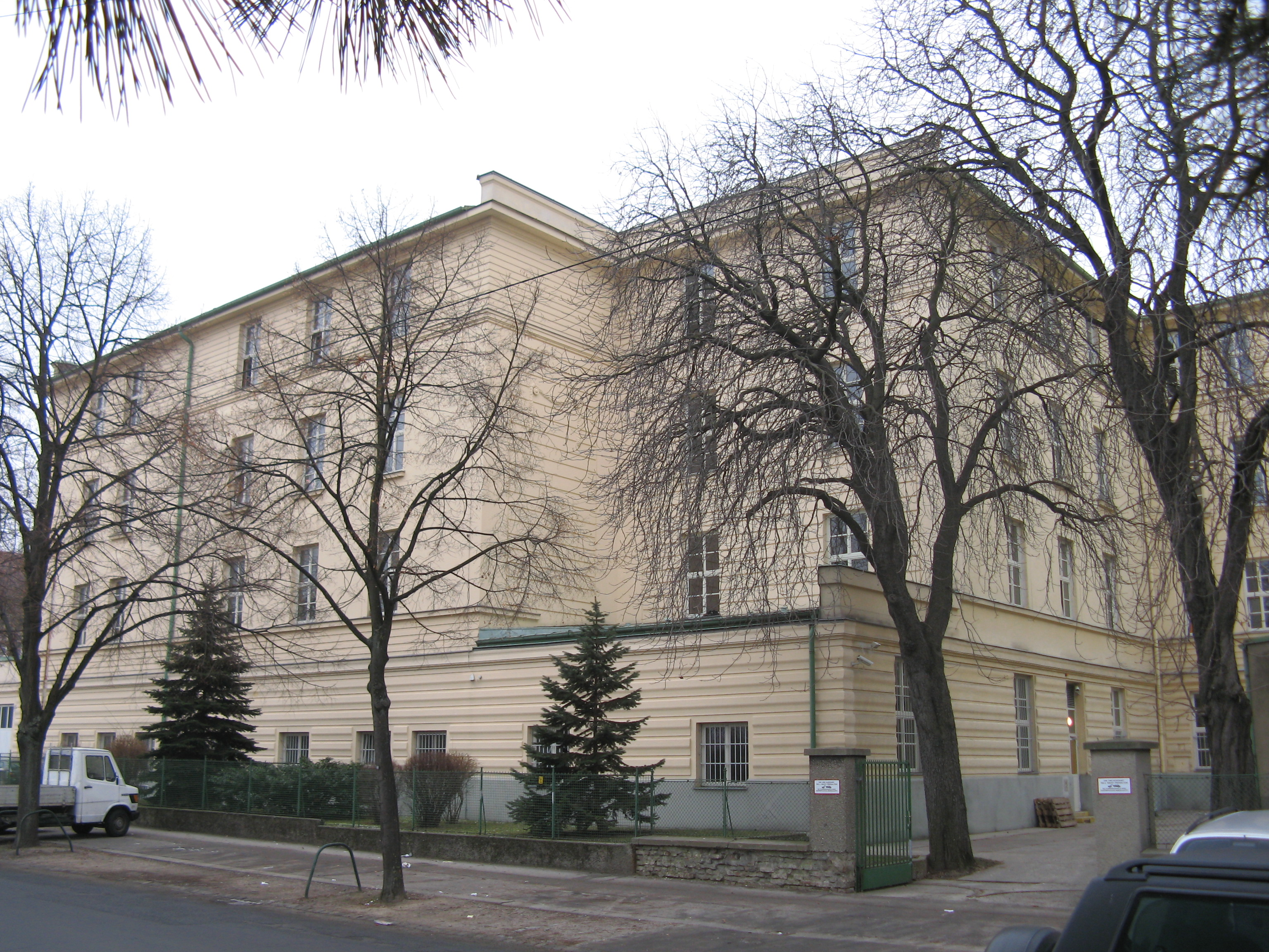 Ehemaliges Obdachlosenheim (1908) von Karl Krepp, Friedrich Mahler und Albrecht Michler in der Unter-Meidlinger Straße, Wien-Meidling